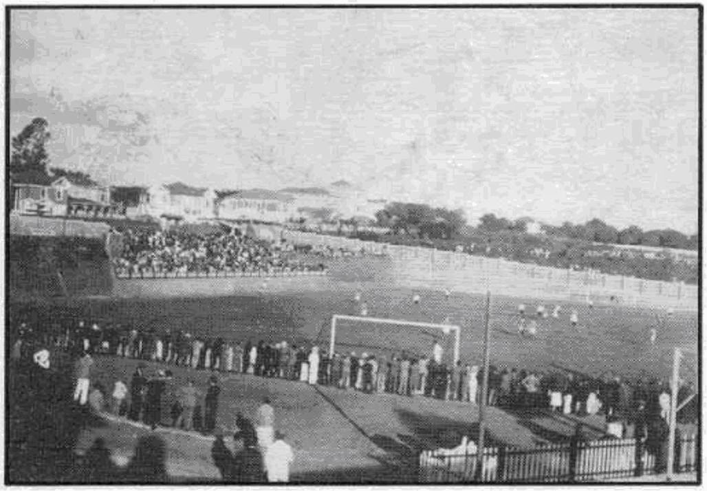 Estádio Julio de Mesquita, construído em 1921 e demolido em 1933, em Campinas.